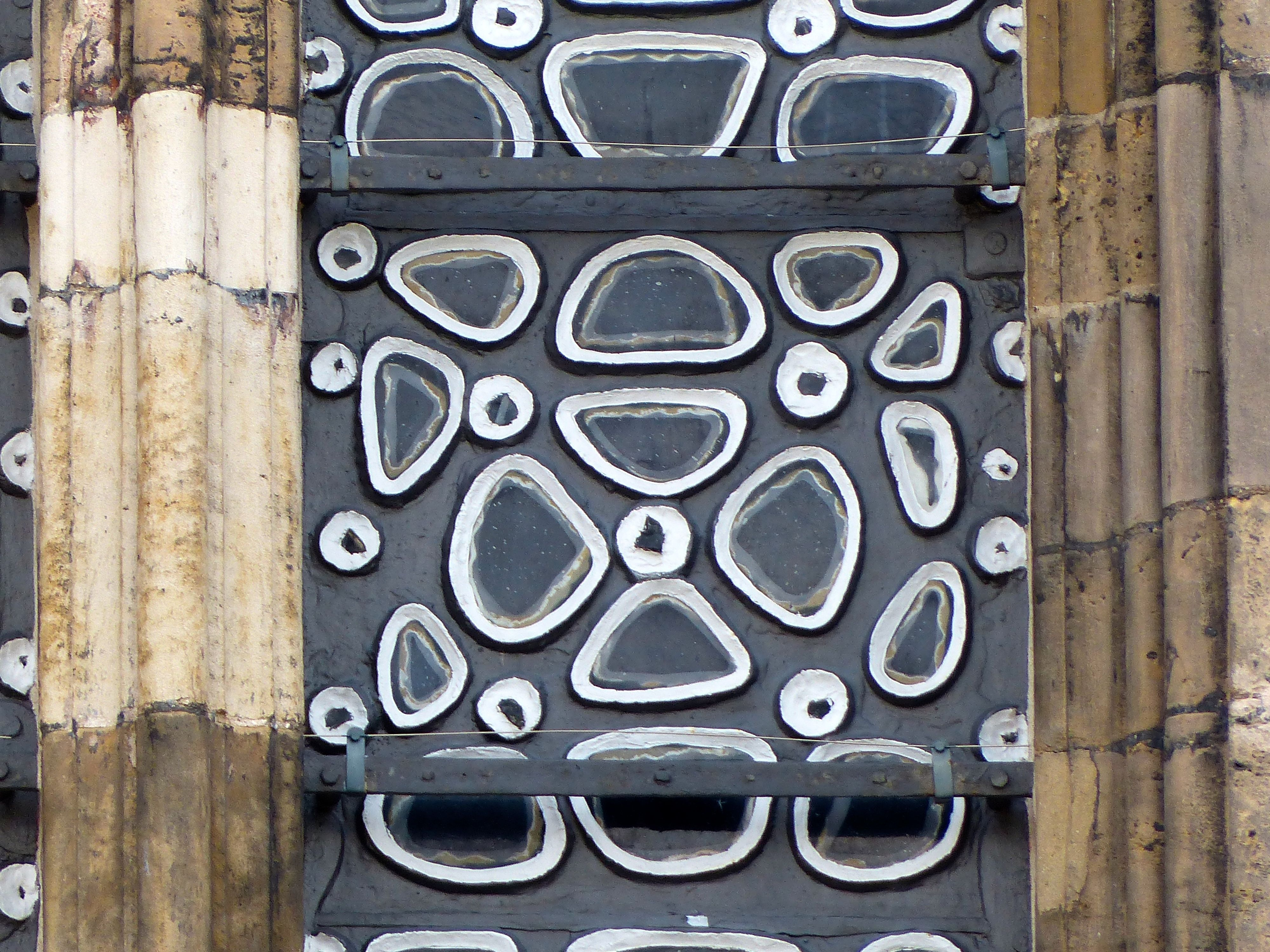 Aachener Dom: Detail des Mataré-Fensters am Westwerk